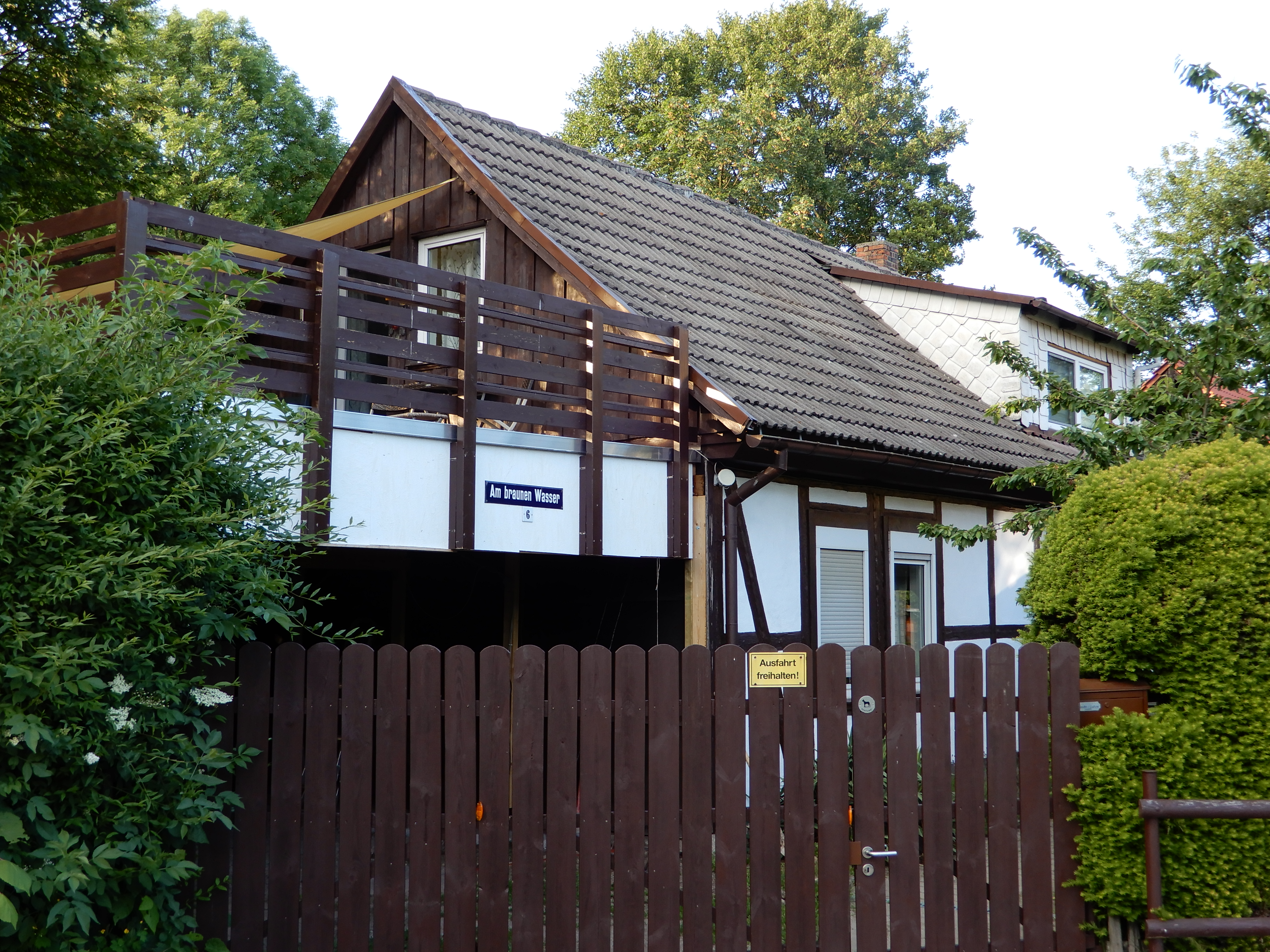 Wohnhaus Am Braunen Wasser 6 in Hasserode, Friedrichsthal